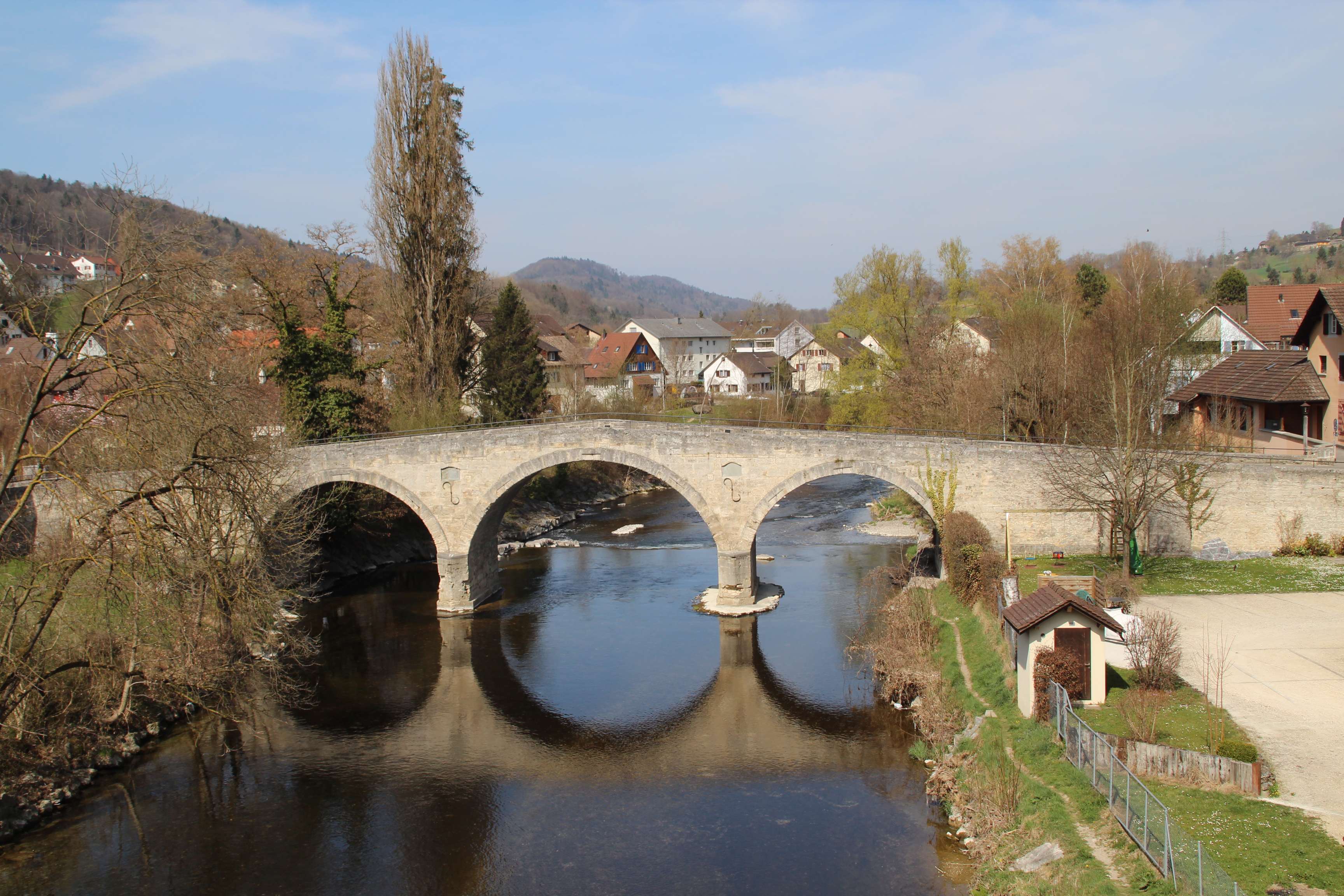 Steinbrücke über die Töss in Rorbas-Freienstein